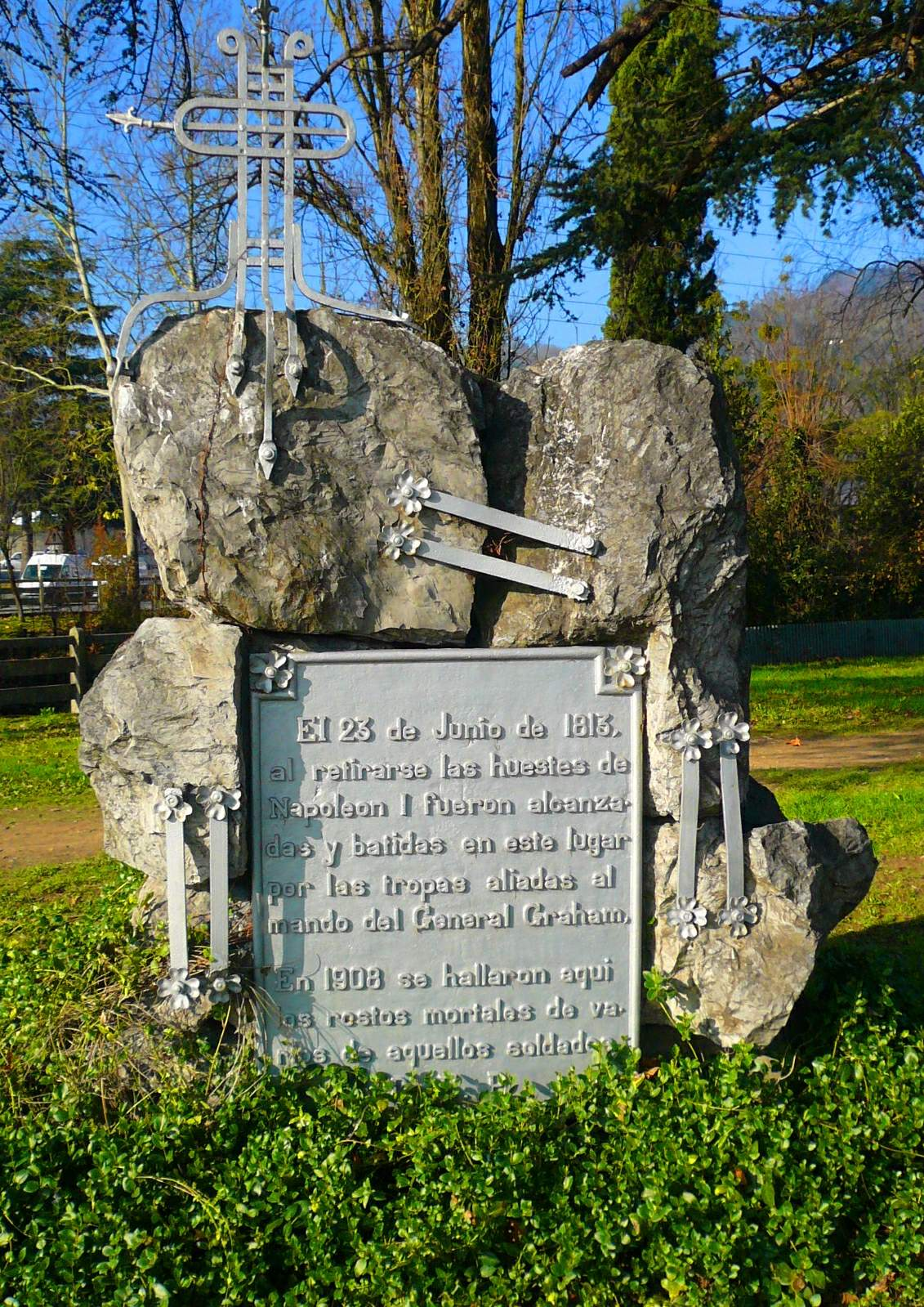 Memorial de los soldados franceses en retirada alcanzados y muertos por las tropas aliadas al mando del general Graham en Beasain, el 23 de junio de 1813. Beasain (Guipúzcoa, País Vasco, España)